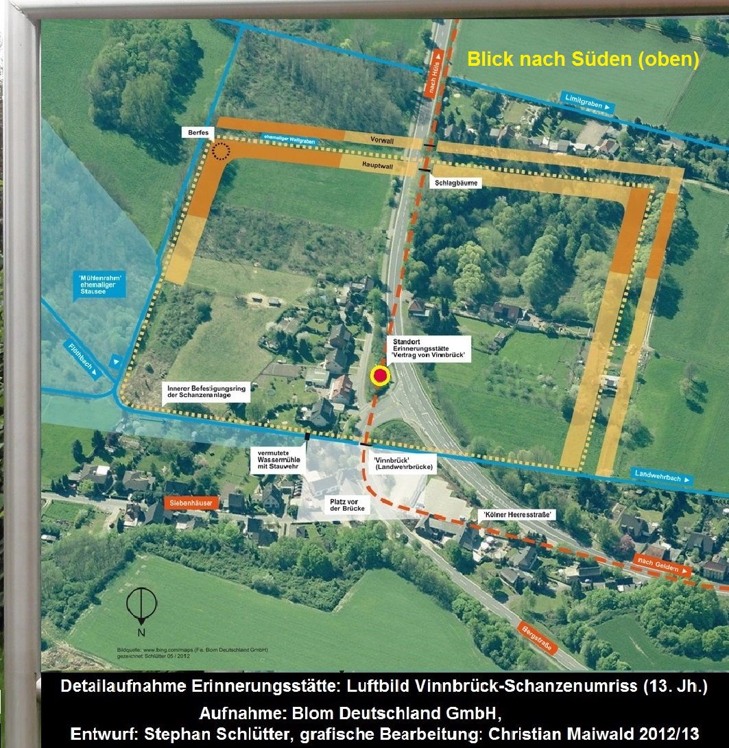 Detailfoto aus der Erinnerungsstätte Vertrag von Vinnbrueck 1284